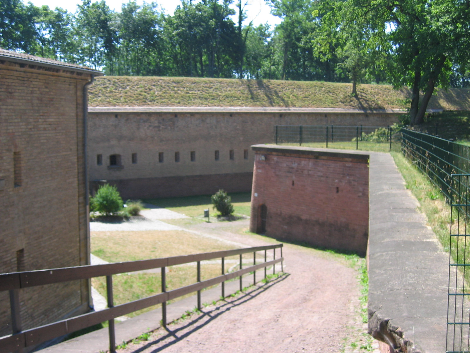 Photographiert von Pascal Auricht, Juni 2005; Lizenz: GNU.